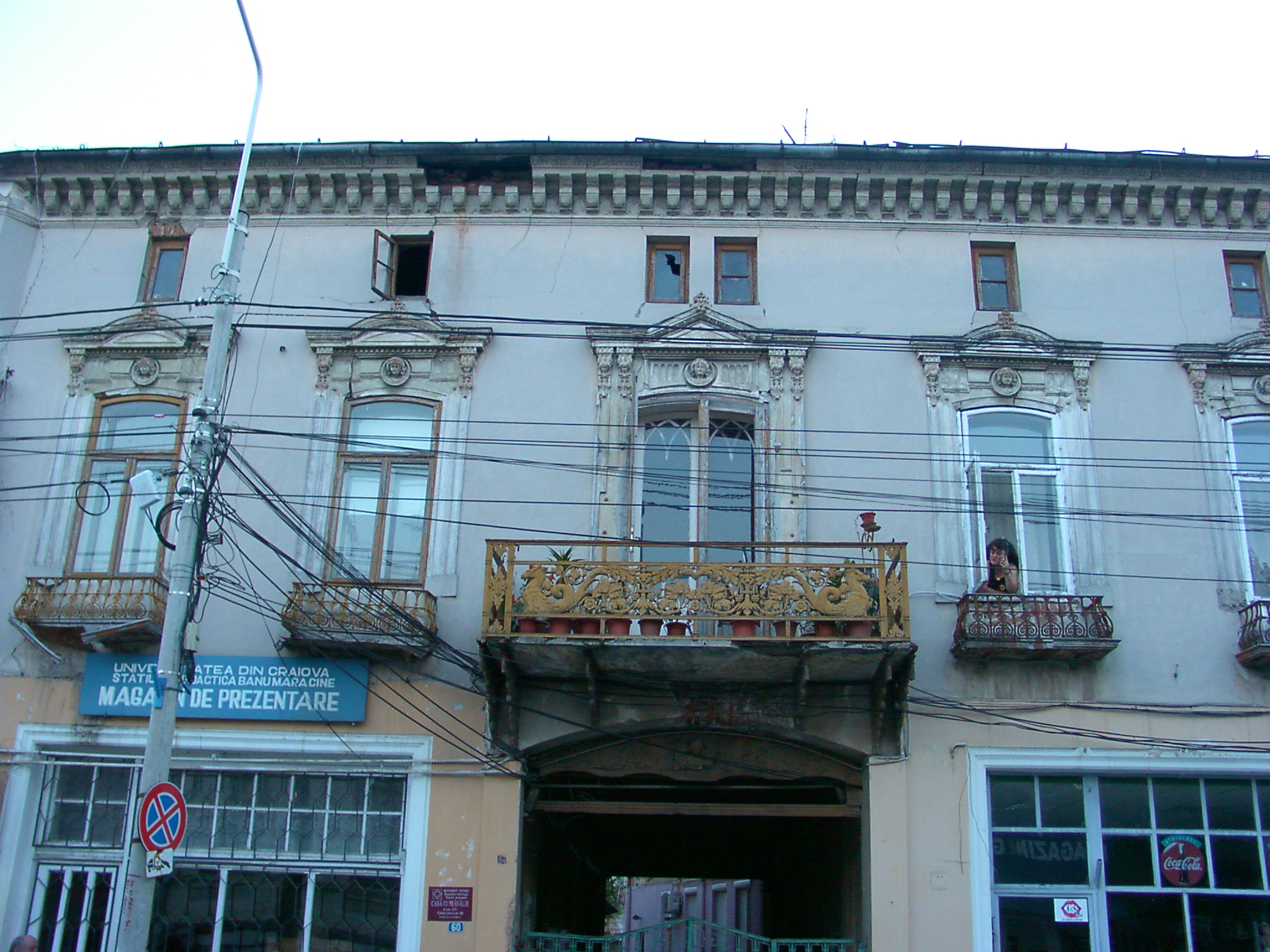 Casă cu prăvălie